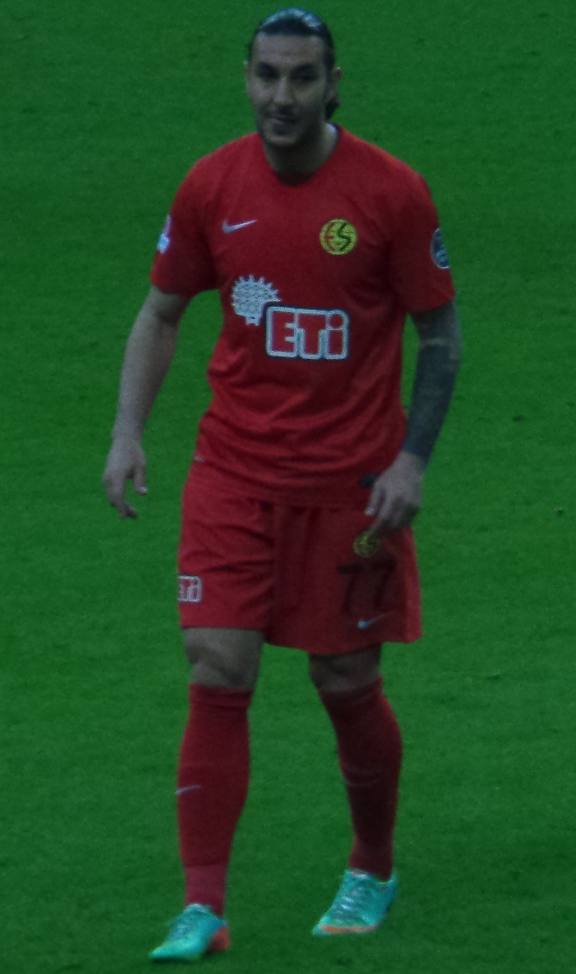 Necati Ateş (2013-14) GS maçında